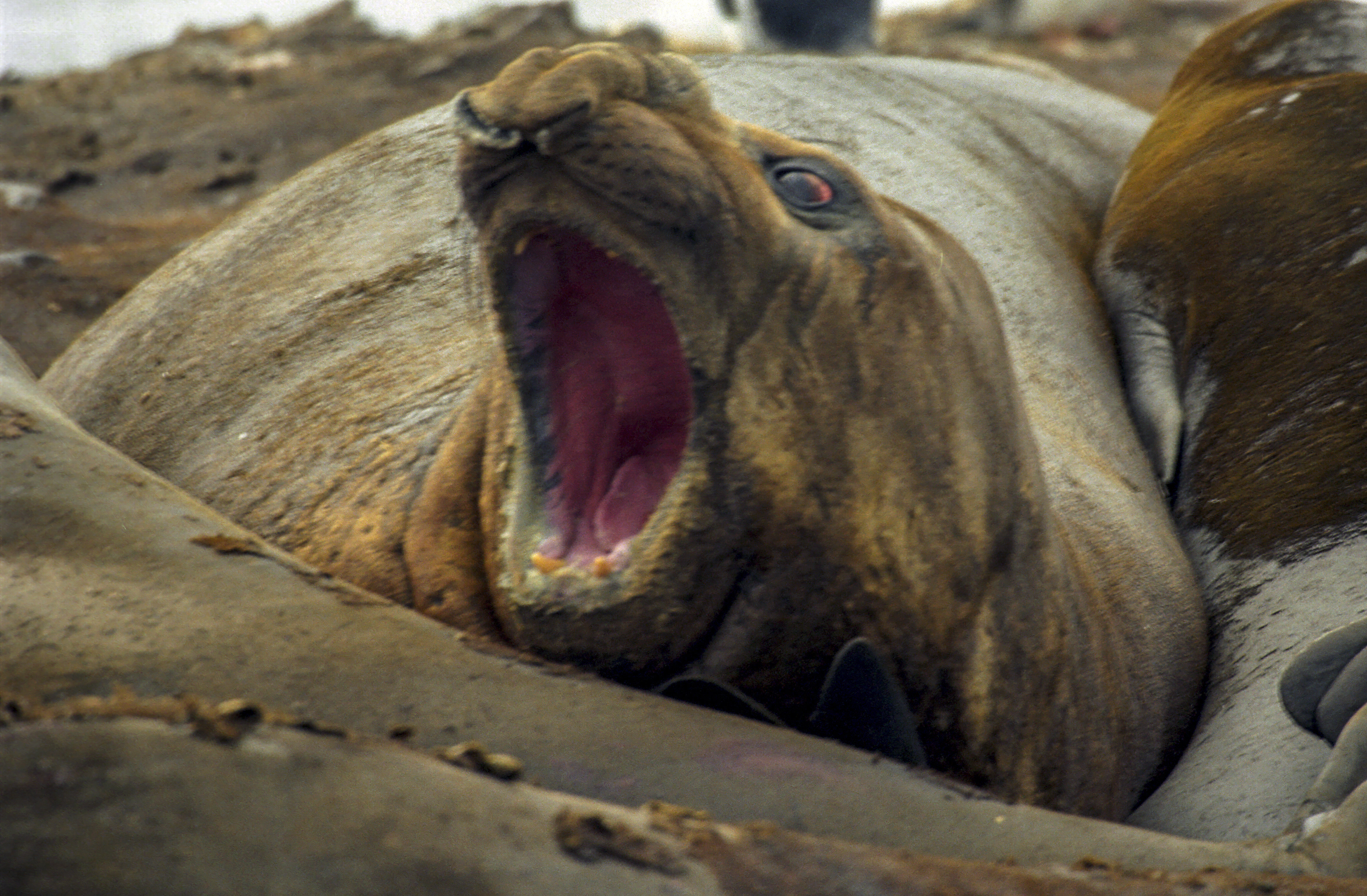 Słoń morski południowy (Mirounga leonina). Wyspa Livingstona